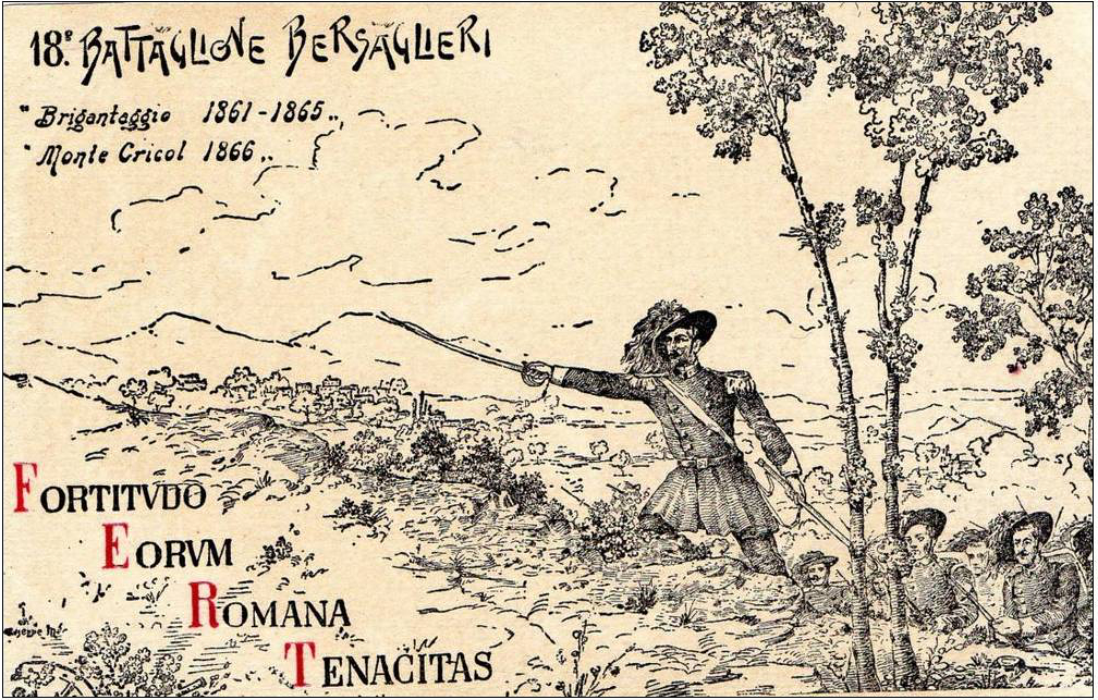 Cartolina postale militare 18 battaglione bersaglieri